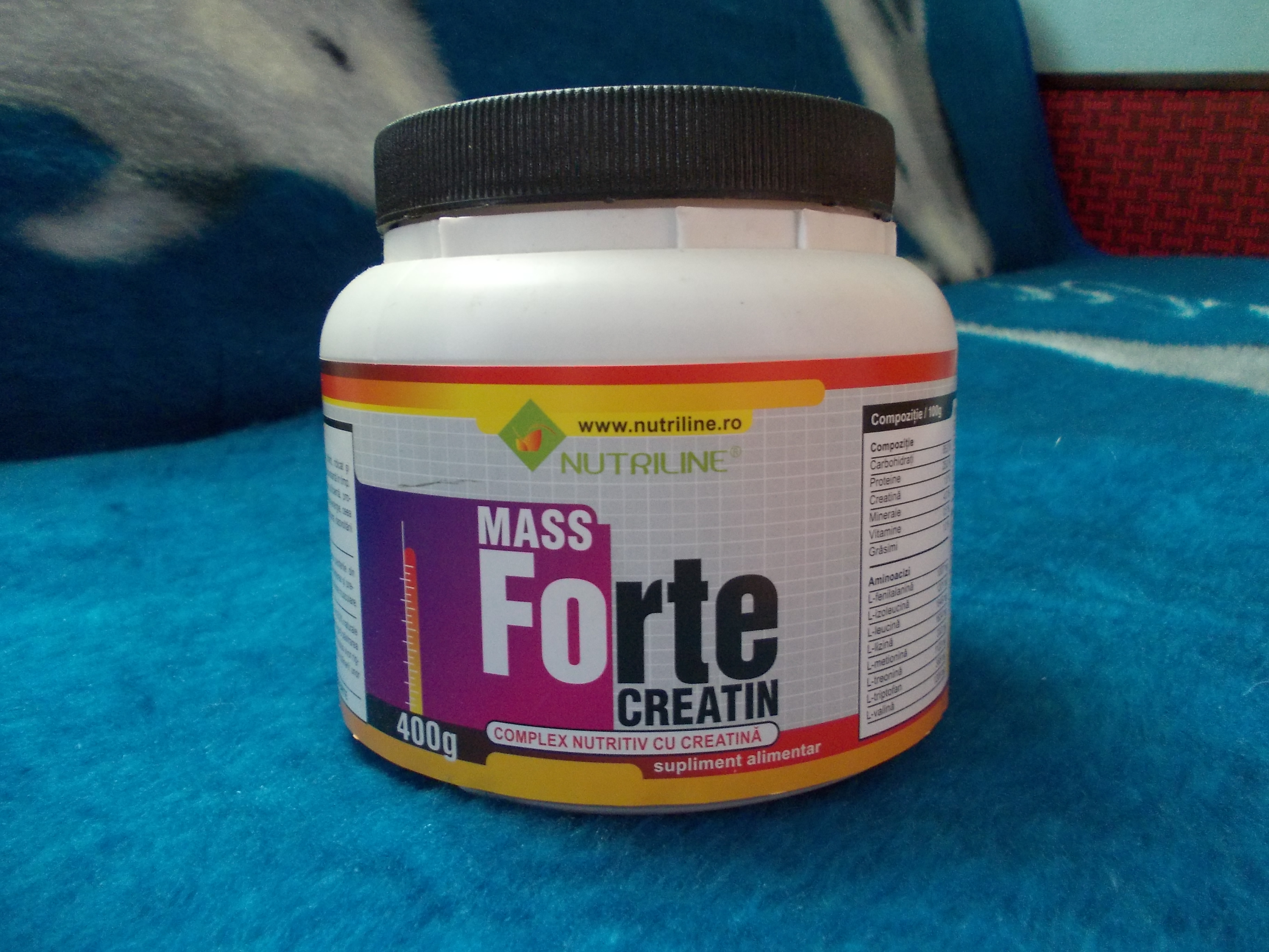 supliment alimentar